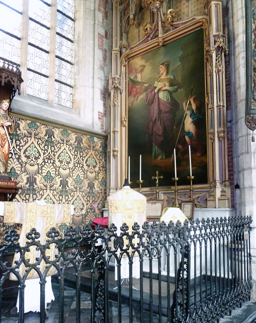 Kerk St-Michiels te Gent